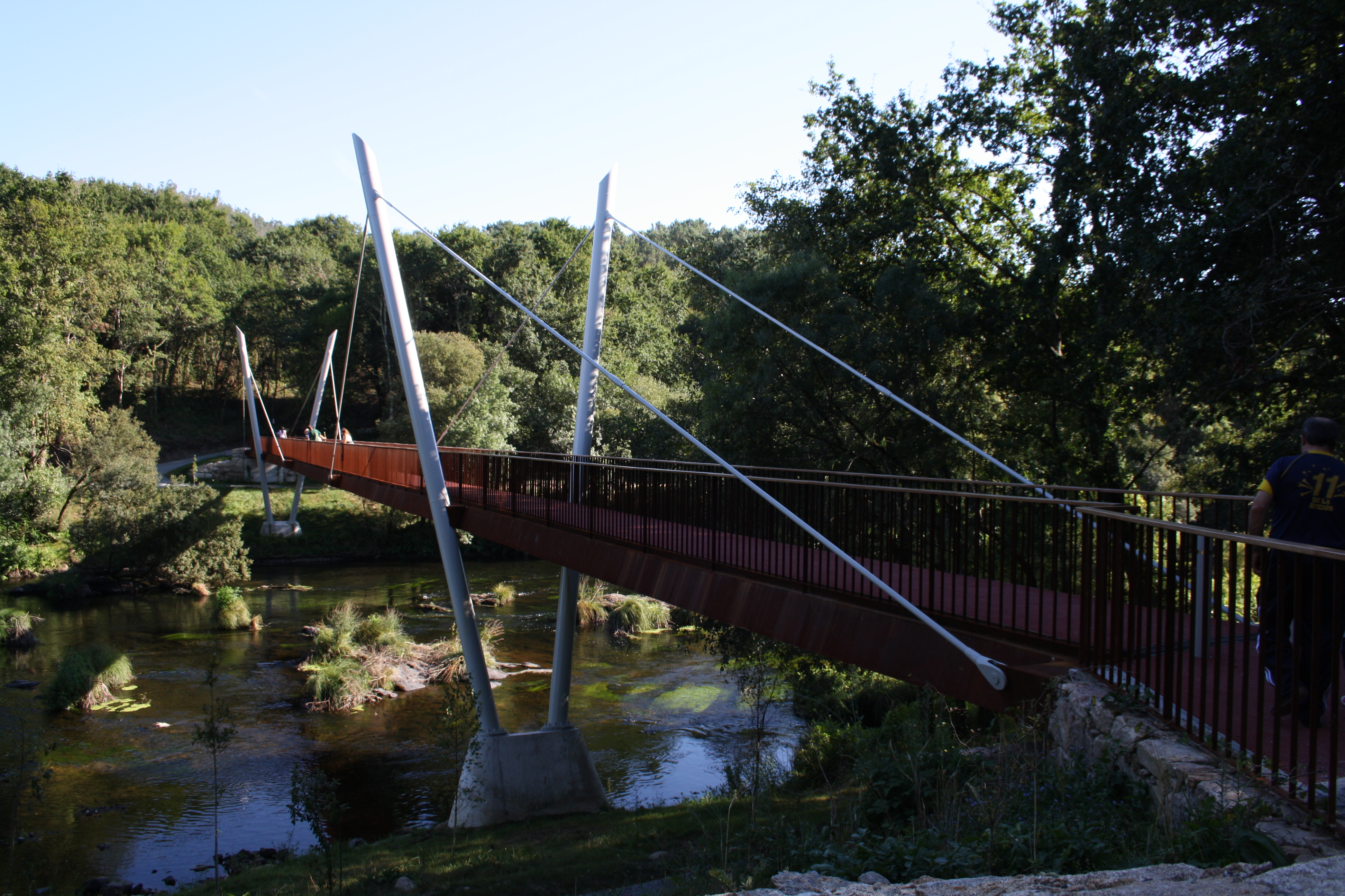 Puente sobre el Río Ulla en Ximonde (San Miguel de Sarandón - Vedra).